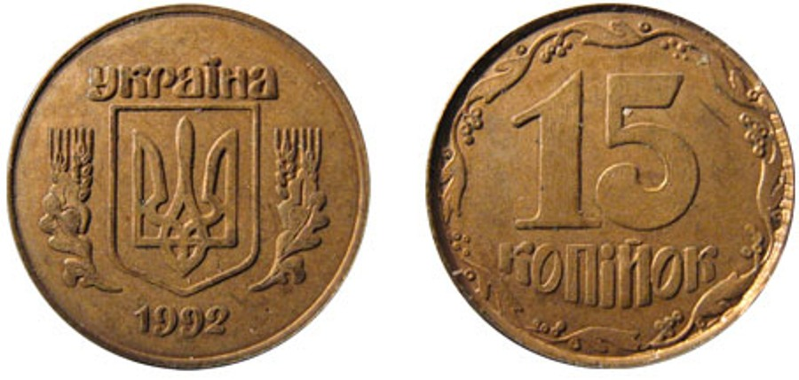 Пробна монета 15 копійок 1992 року.